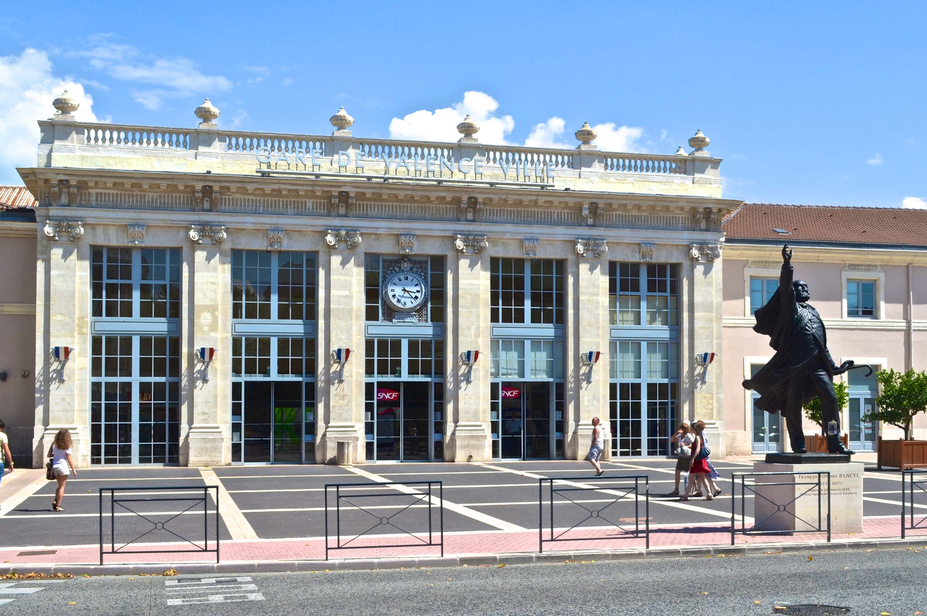 Gare de Valence (Drôme) et statue de Désiré Bancel